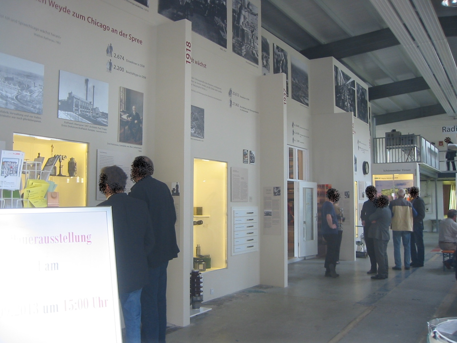 Ausstellung des Industriesalon Schöneweide in Berlin-Oberschöneweide